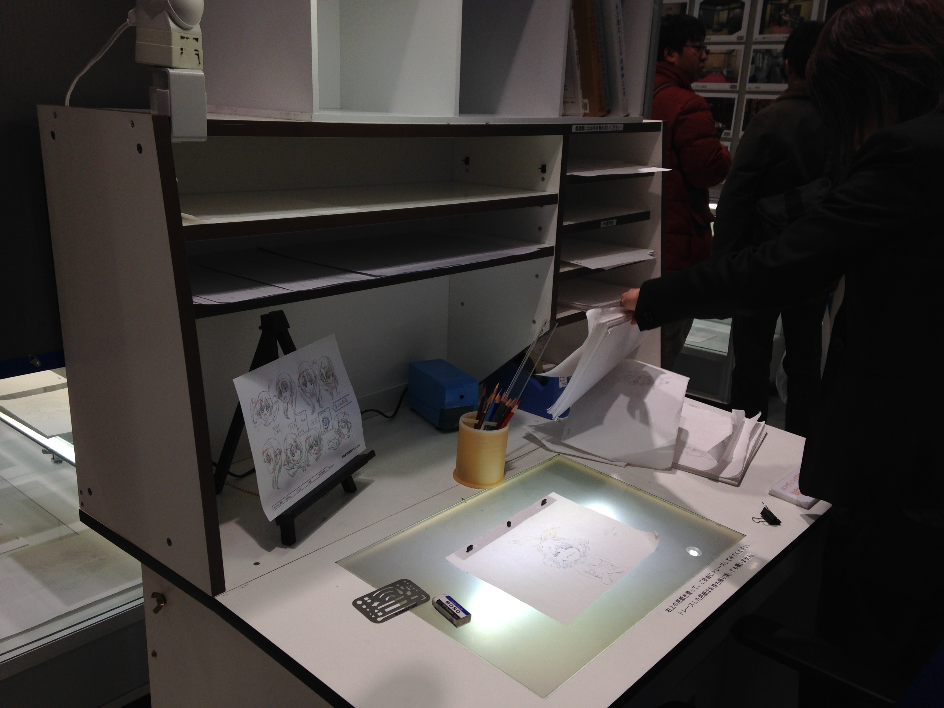 SHIROBAKO